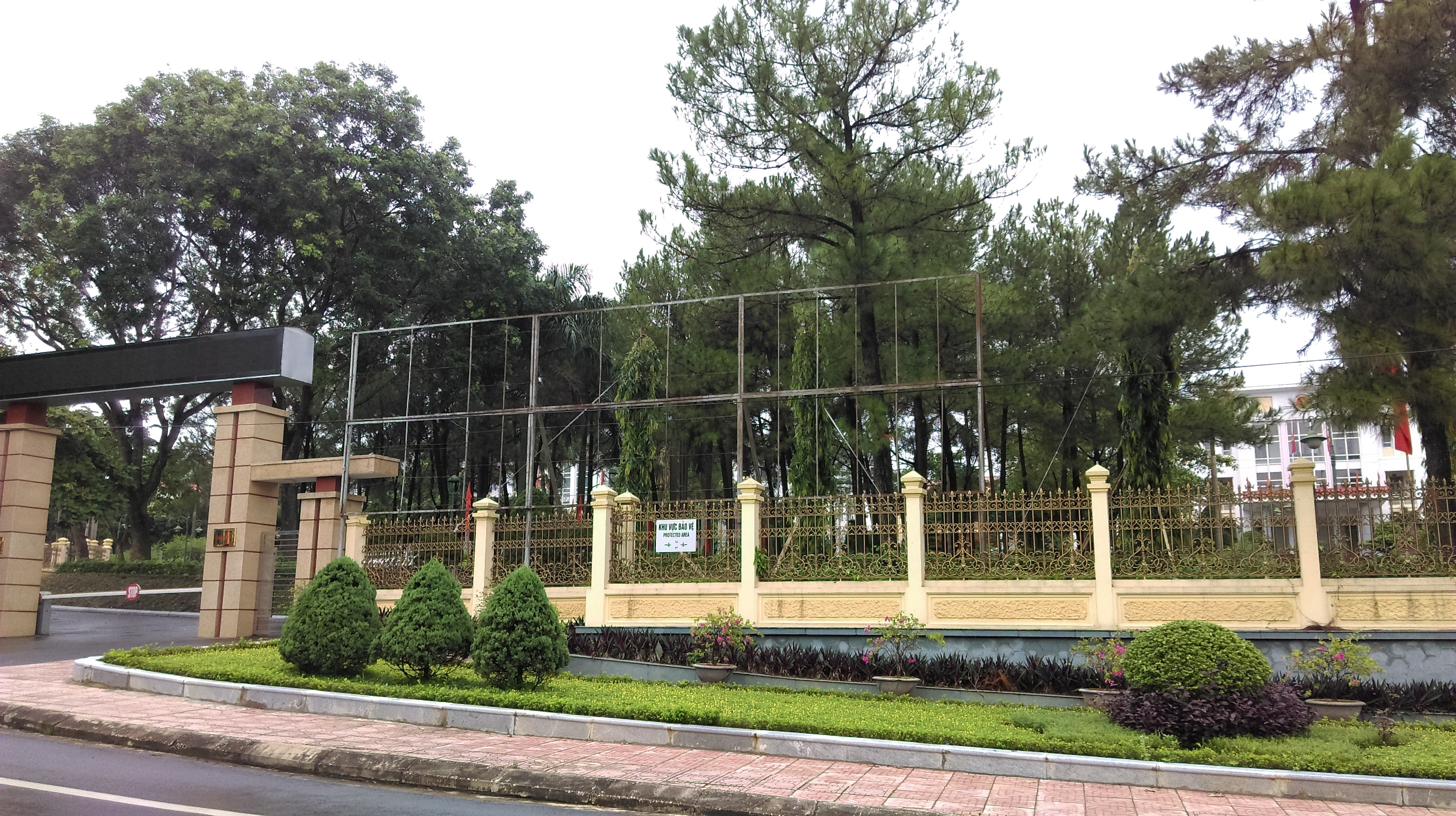 UBND thành phố Tam Điệp, Ninh Bình